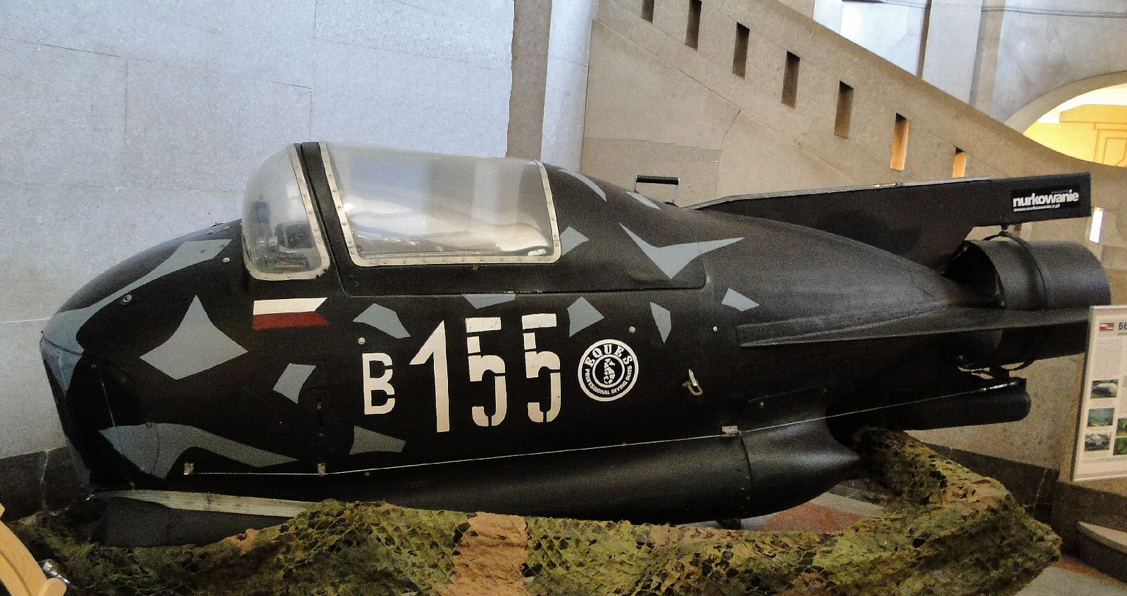 Pojazd podwodny "Błotniak" - rekonstrukcja wykonana przez Stowarzyszenie Akwanautów Militarnych w Gdyni (pojazd jest w pełni sprawny)